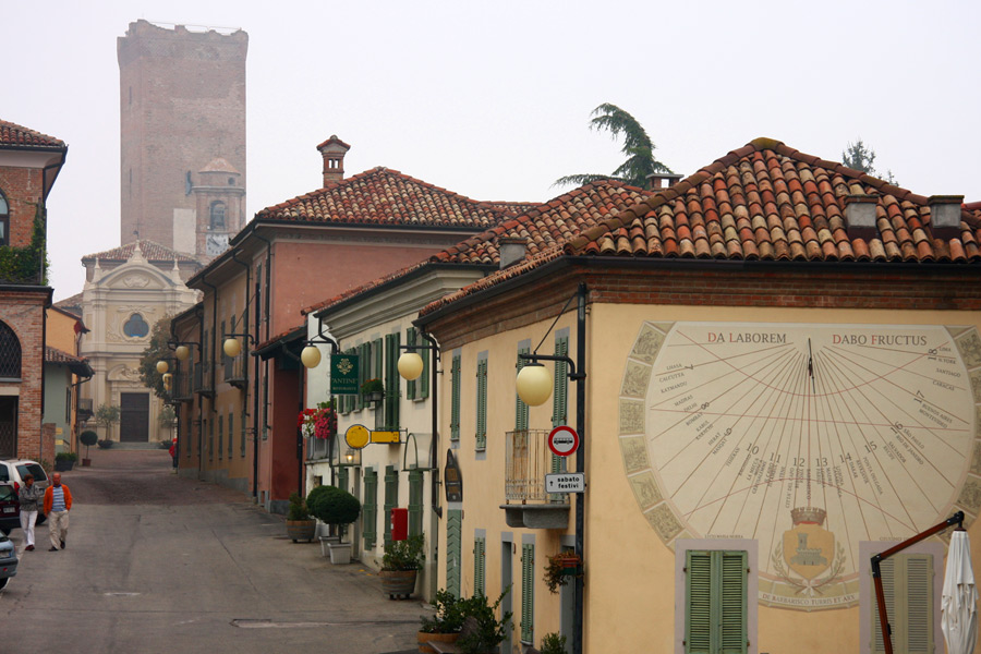 Scorcio del paese di Barbaresco (CN), sullo sfondo la chiesa parrocchiale e la torre medioevale, in primo piano la recente meridiana.